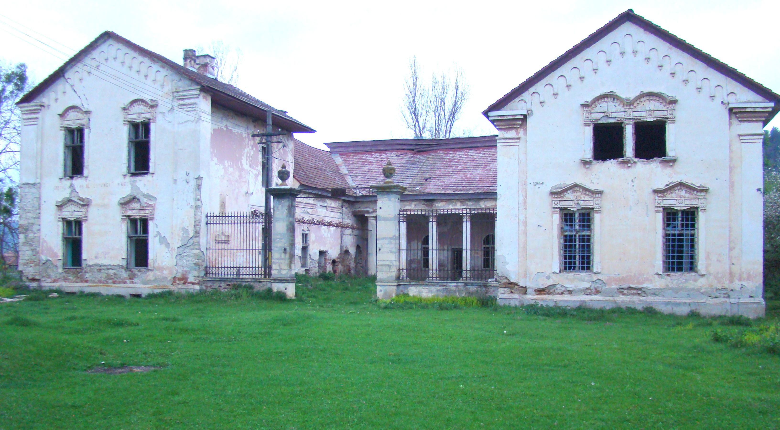 Castelul Bethlen, sat Dragu; comuna Dragu, judeţul Sălaj 01